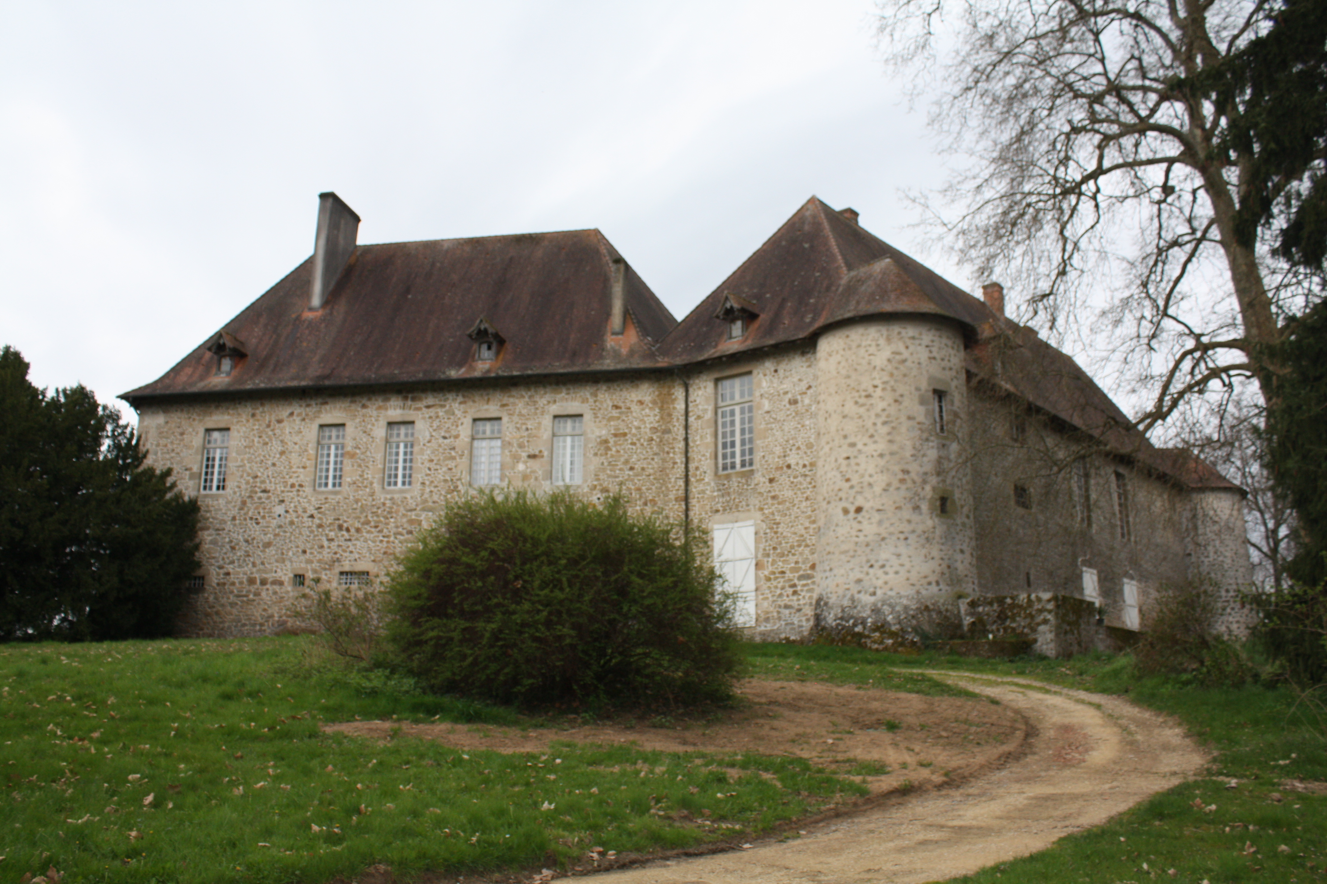 Château de Saint-Auvent